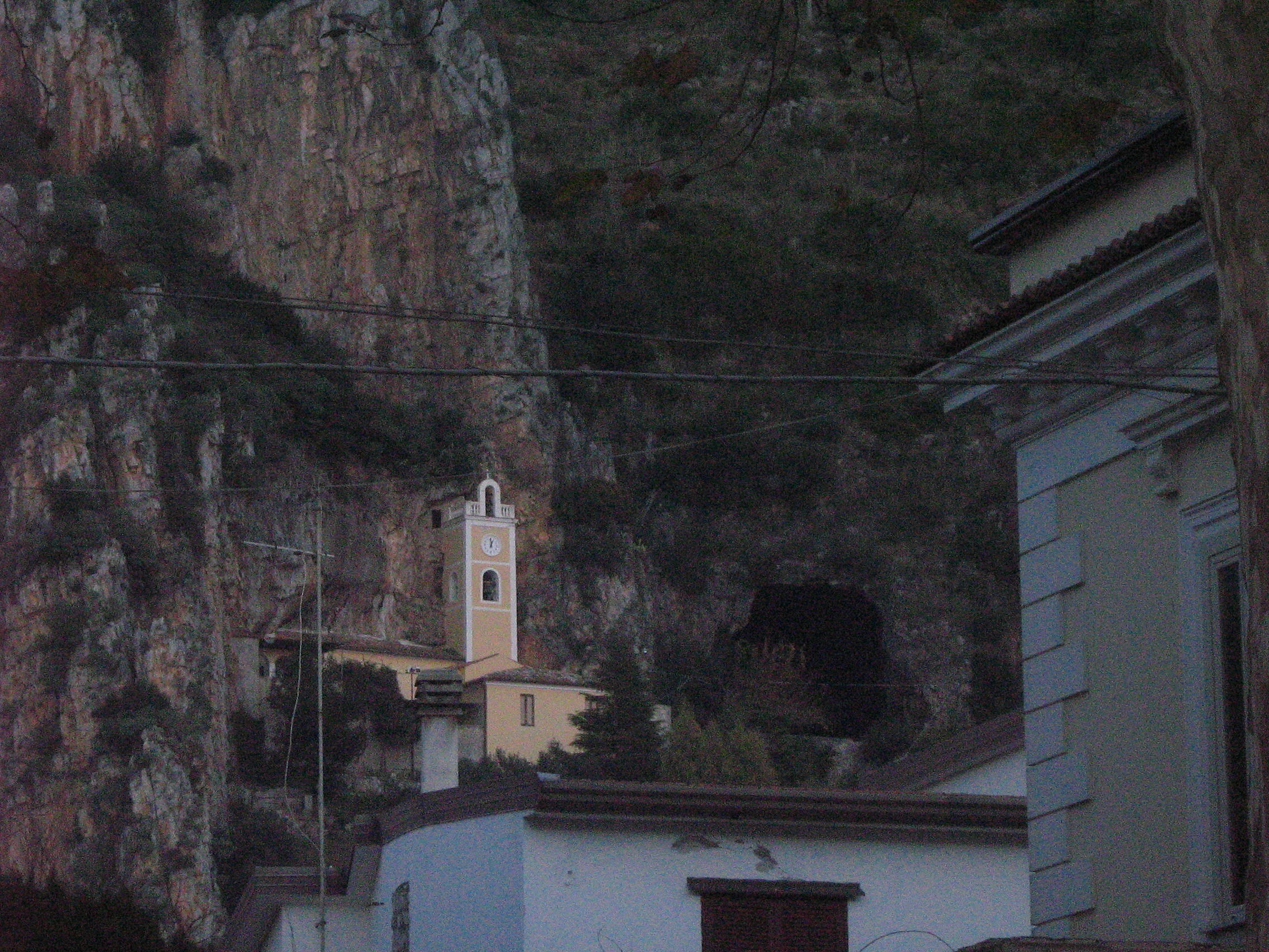 Vista del Santuario della Madonna della Grotta, Praia a Mare.